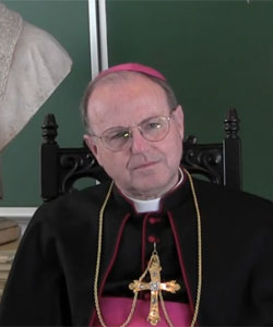 biskup